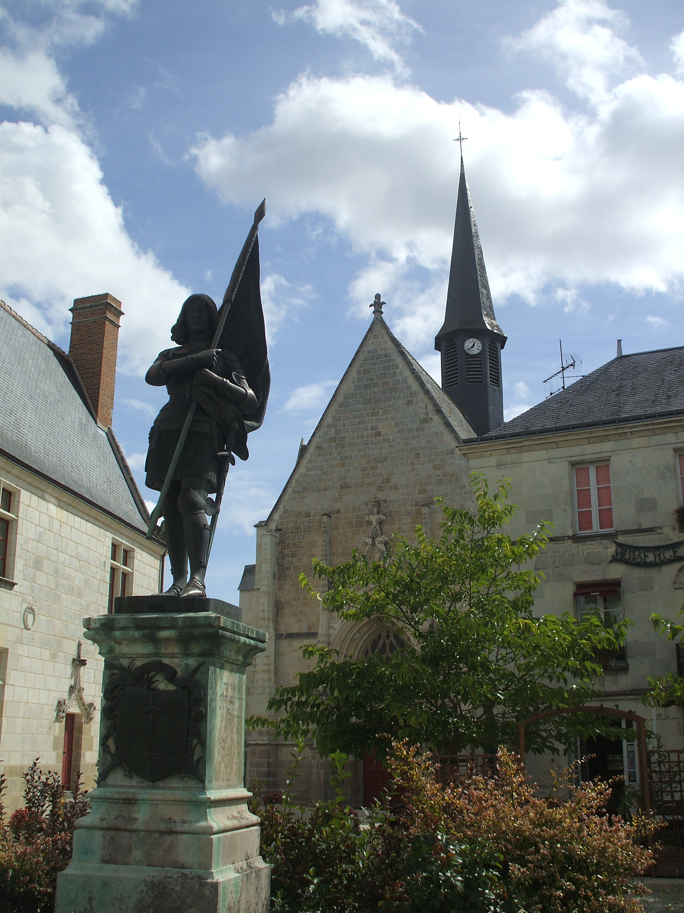 Sainte-Catherine-de-Fierbois, Eglise + Statue de Jeanne d'Arc; .